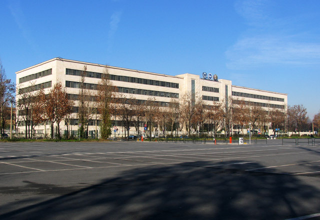 FIAT - Torino 12/2006